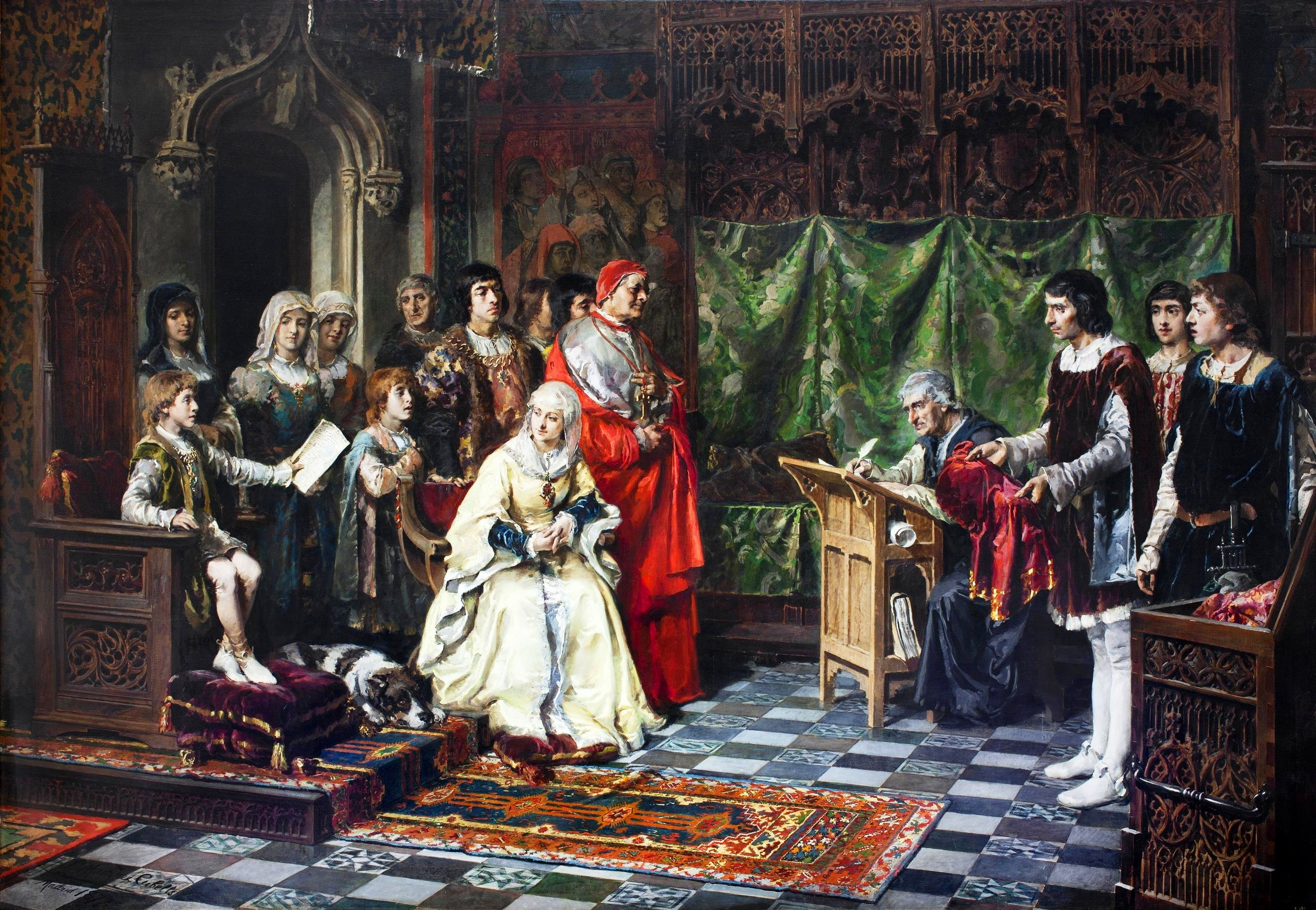 El lienzo representa a la reina Isabel la Católica y al cardenal Cisneros, entre otros personajes, educando al príncipe Juan de Aragón, hijo de los Reyes Católicos y heredero de las coronas de Aragón y Castilla hasta su defunción en 1497.